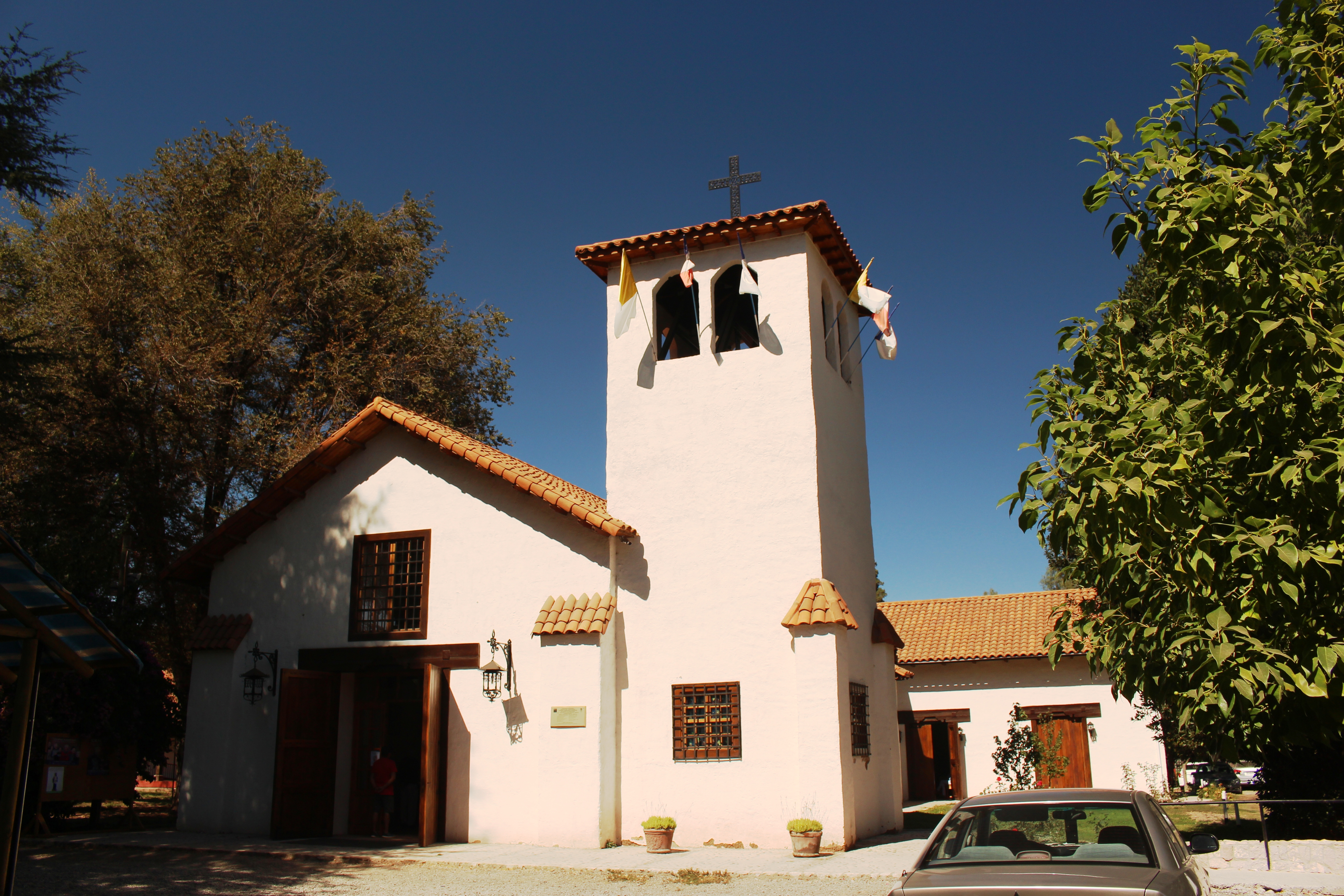 Frontis Parroquia La Compañía en Graneros, restaurada en el 2017